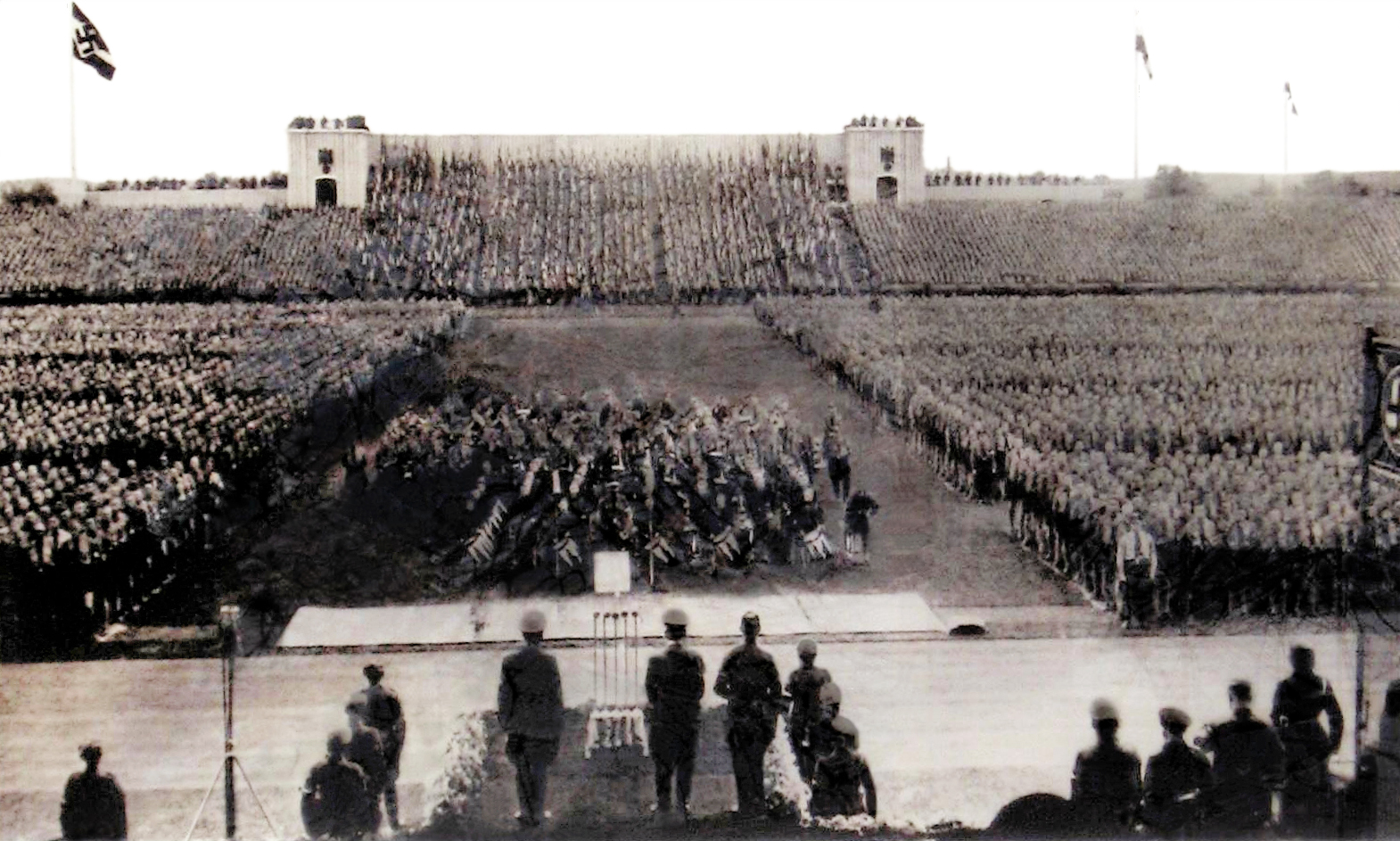 Fotografie einer unter Panoramafreiheit fallenden Tafel des Dokumentationszentrums Reichsparteitagsgelände in Nürnberg. Die Tafel betrifft das „Städtische Stadion Nürnberg“, das später in „Frankenstadion“ umbenannt wurde und und bis 30. Juni 2012 „easyCredit-Stadion“ hieß. Seitdem ist der Name des Stadions Stadion Nürnberg